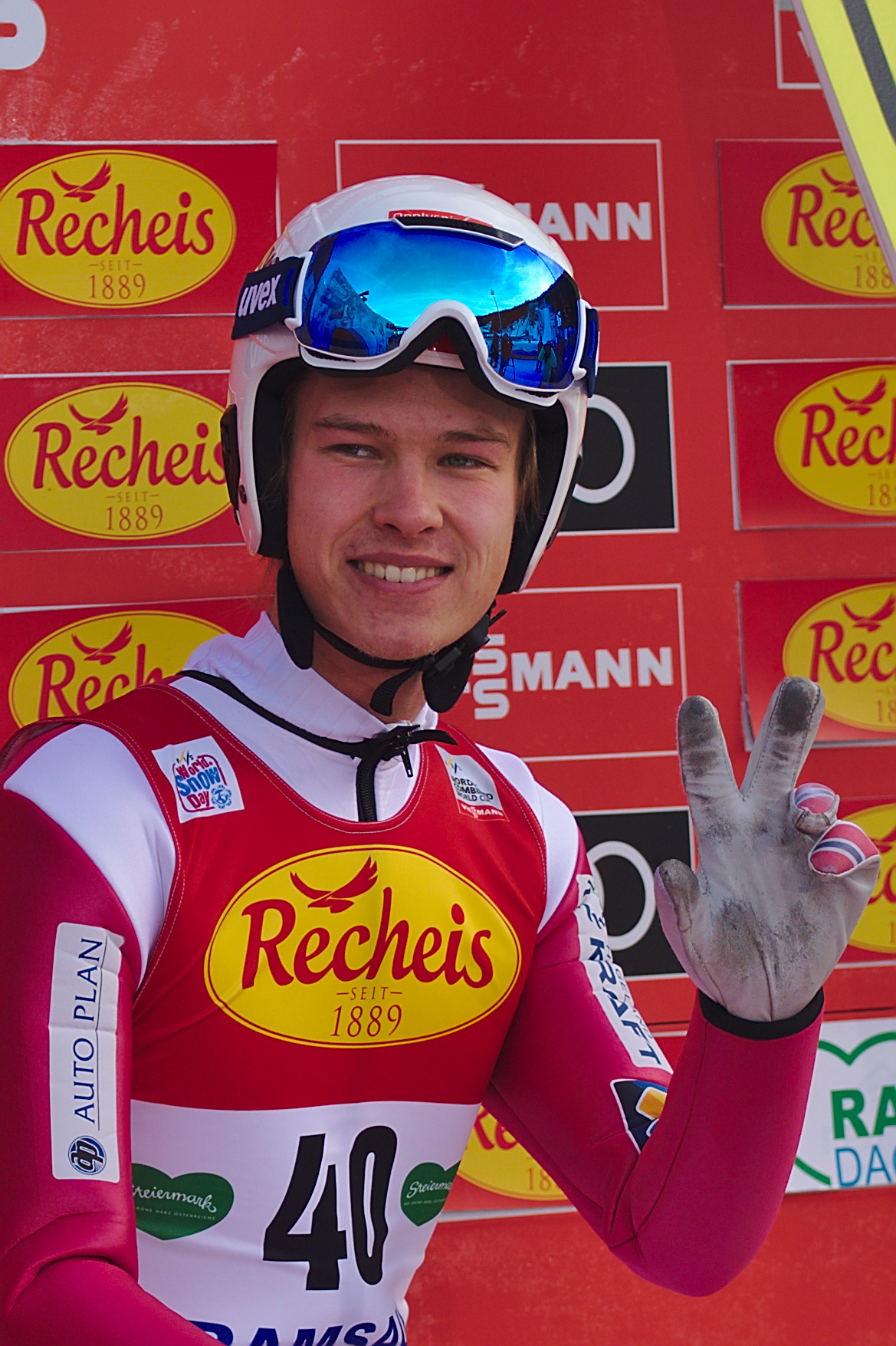 FIS Worldcup Nordic Combined Ramsau 2016. Bild zeigt Espen Andersen (NOR)